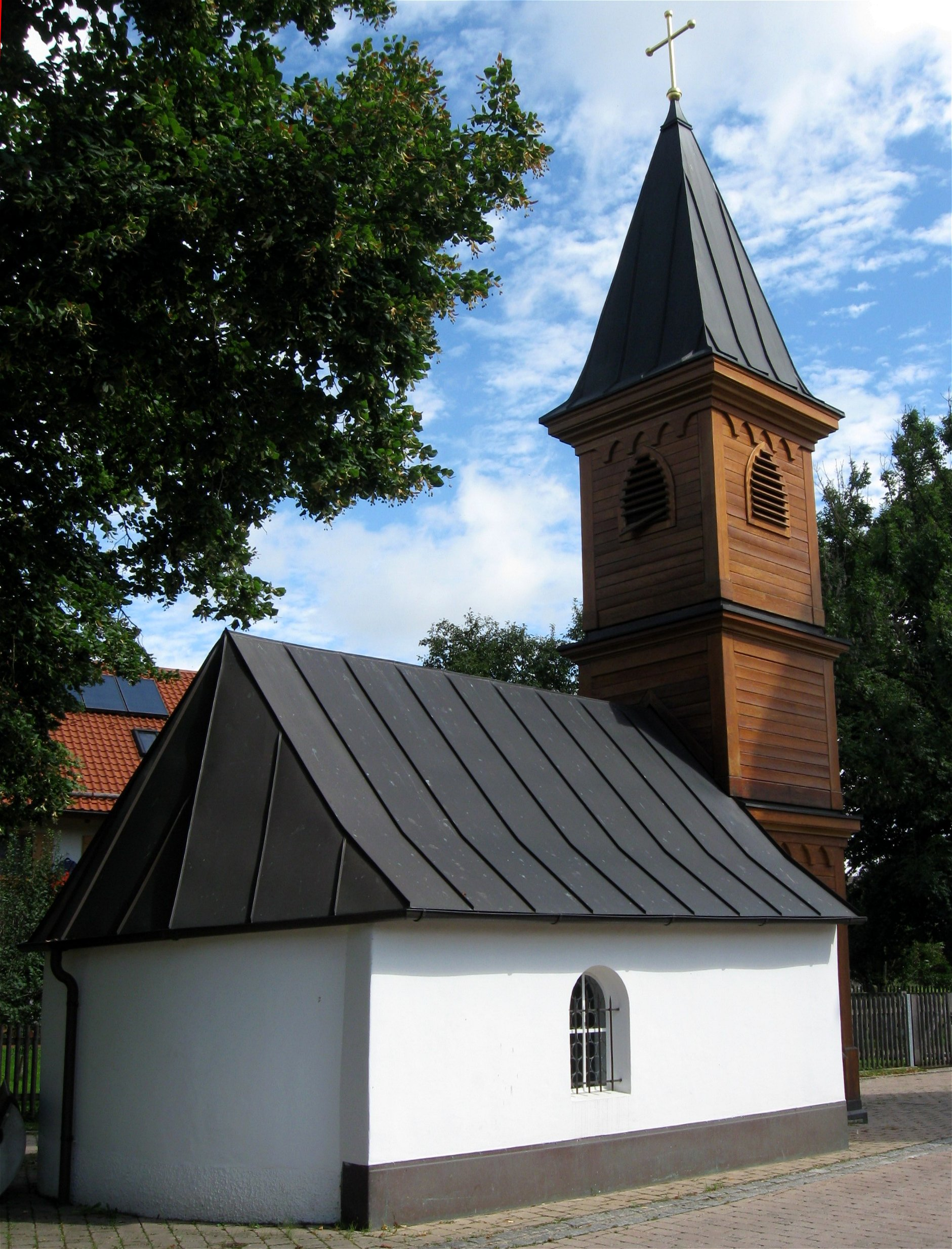 Kapellenplatz, Oedenstockach; St.-Anna-Kapelle, schlichter einschiffiger Bau mit leicht eingezogener Apsis, 19. Jahrhundert, im Kern wohl älter. Hölzerner Turm, 20. Jahrhundert. D-1-84-140-3